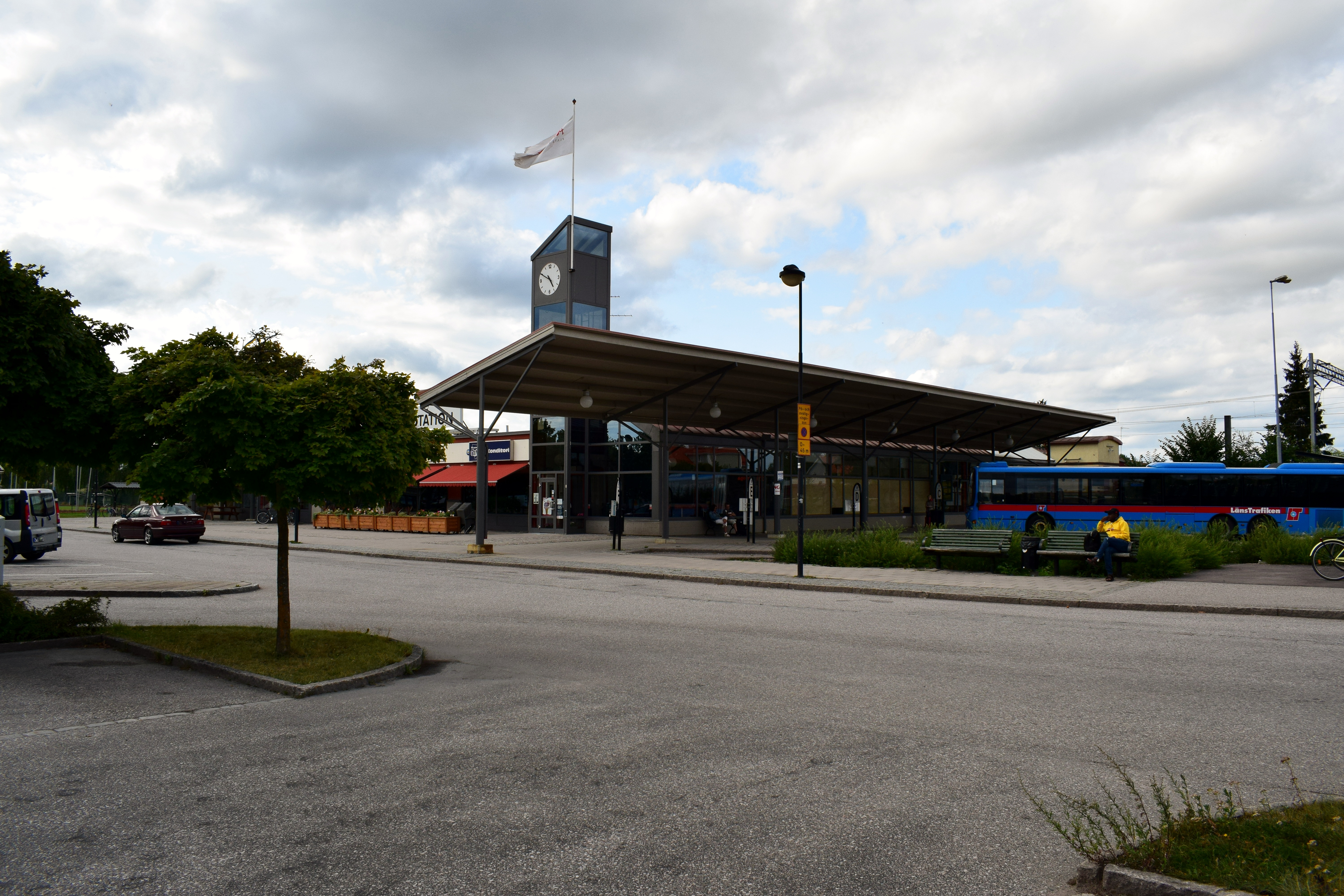 Resecentrum i Arboga sommaren 2019